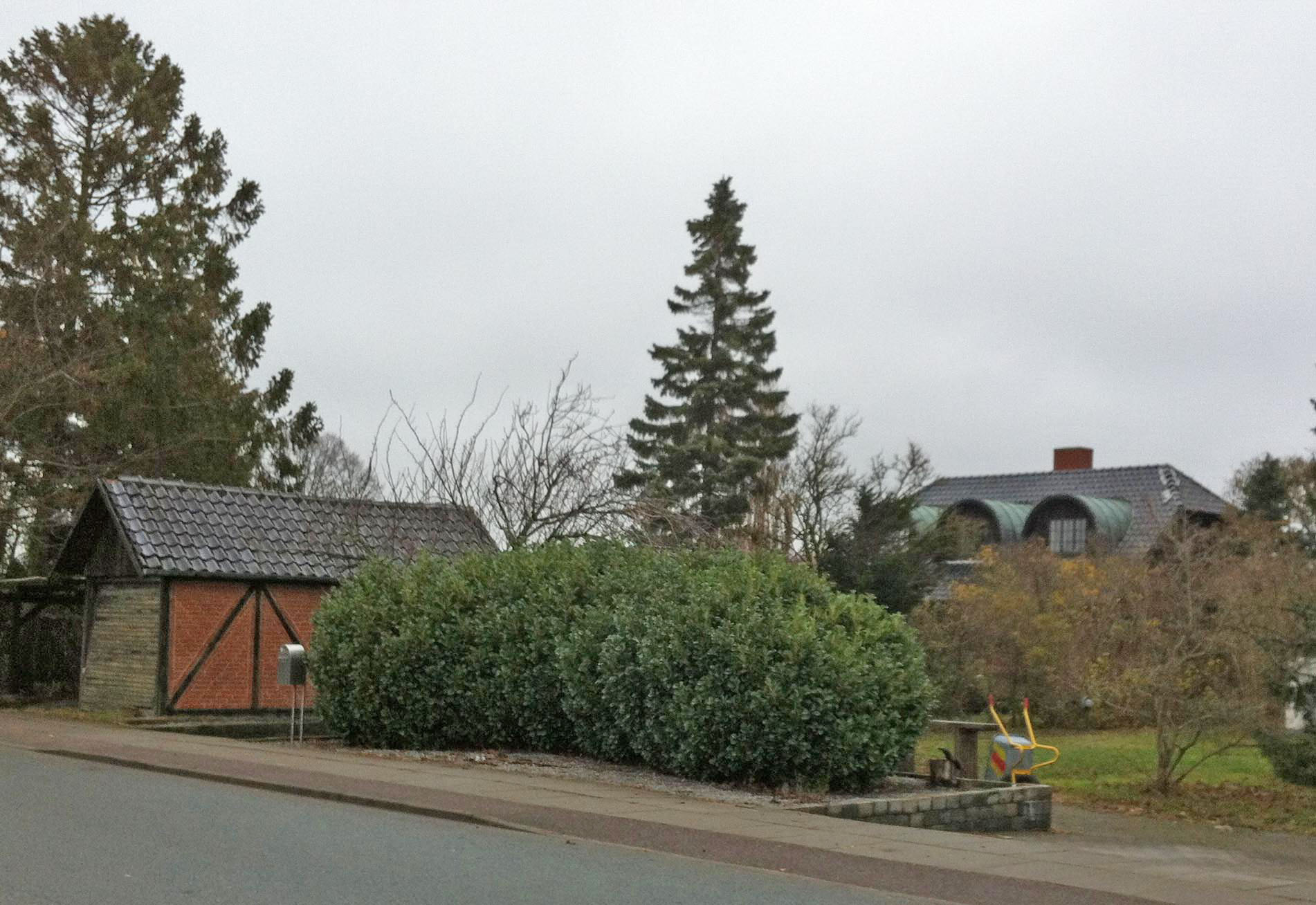 Amagerbro Station med retirade, genopført i Store Magleby